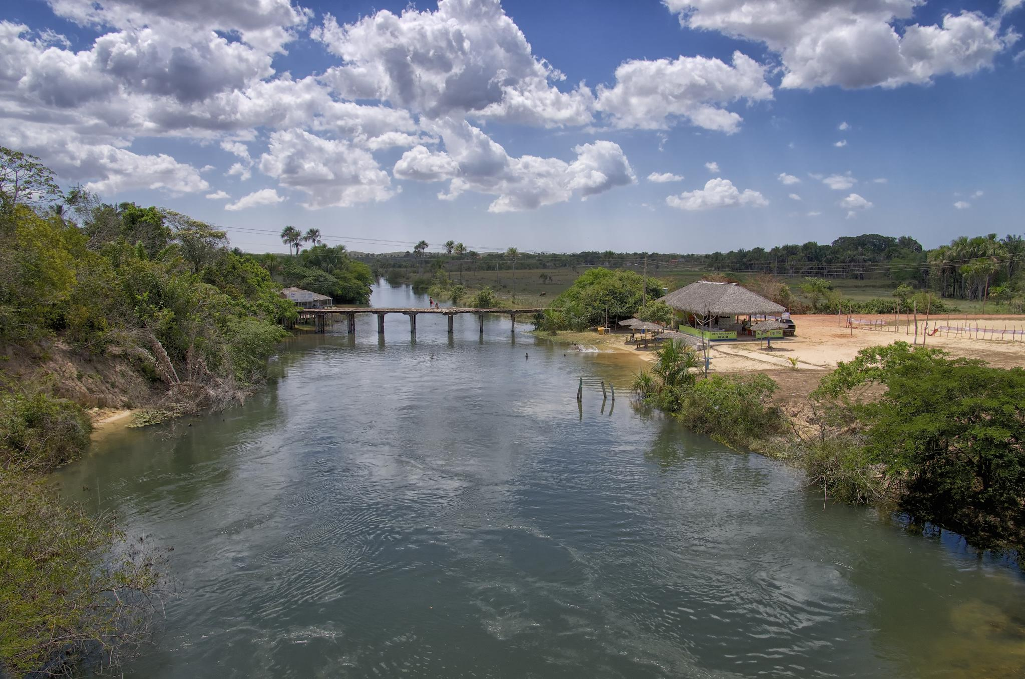 Águas do Maranhão